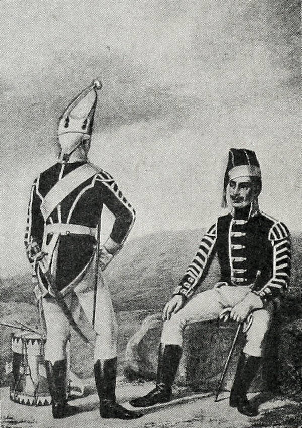 Батальонные барабанщики украинской инспекции Киевского гренадерского полка (1802—1805 гг.). Это изображение было использовано для иллюстрирования статьи «Киевский, 5-й гренадерский, генерал-фельдмаршала князя Николая Репнина, ныне Е. И. Выс. Наследника Цесаревича, полк» опубликованной в двенадцатом томе «Военной энциклопедии», который был издан книгоиздательским товариществом И. Д. Сытина в 1913 году в столице Российской империи городе Санкт-Петербурге. Более подробное описание к этой картинке можно прочесть в указанной выше статье.